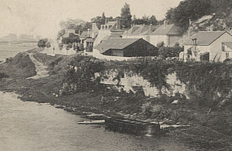 Coteau et paysage urbain de Fondettes sur les rives de la Loire. Début du XXe siècle.